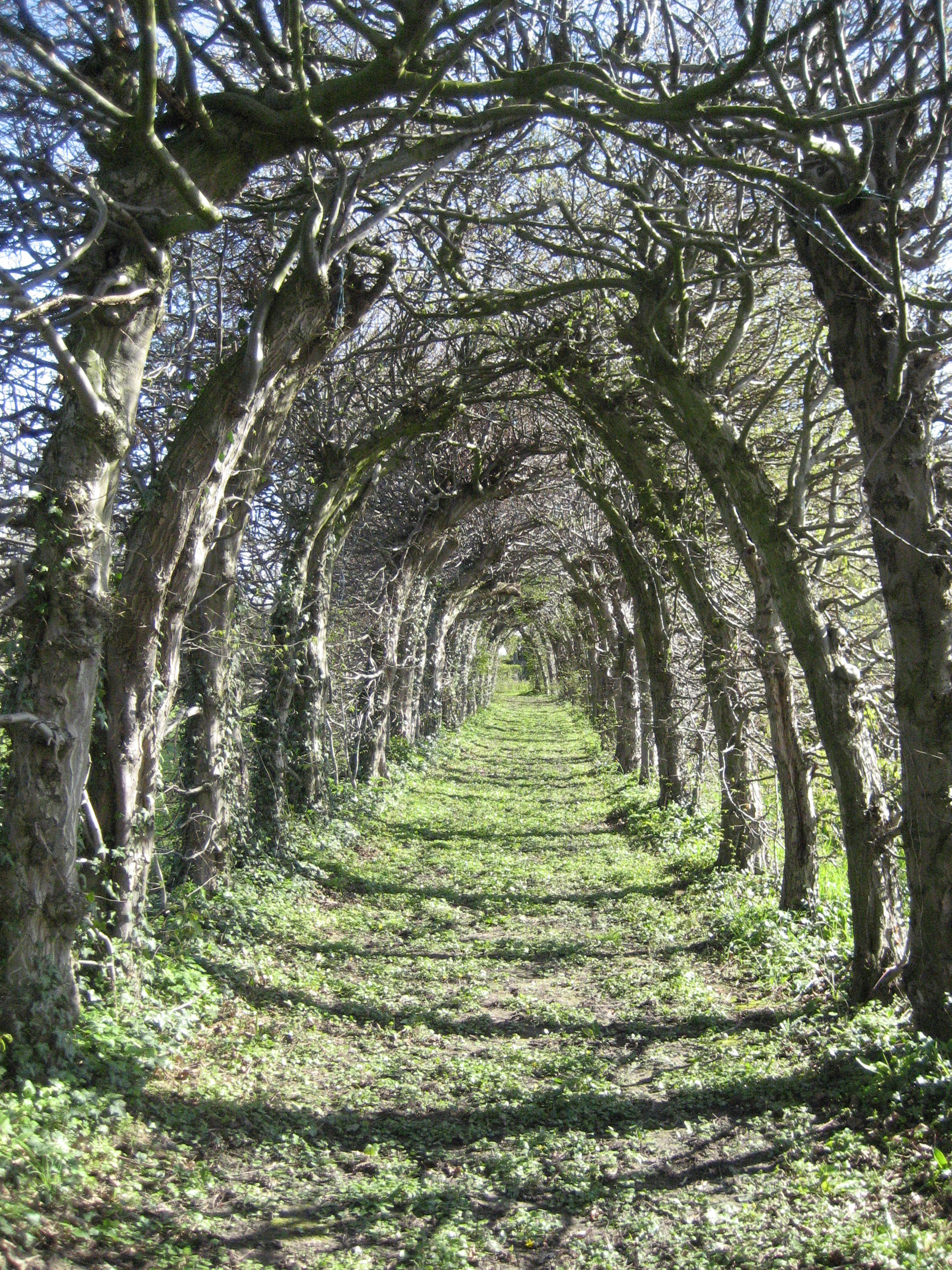 Charmille à Pitet (Fallais/Braives)